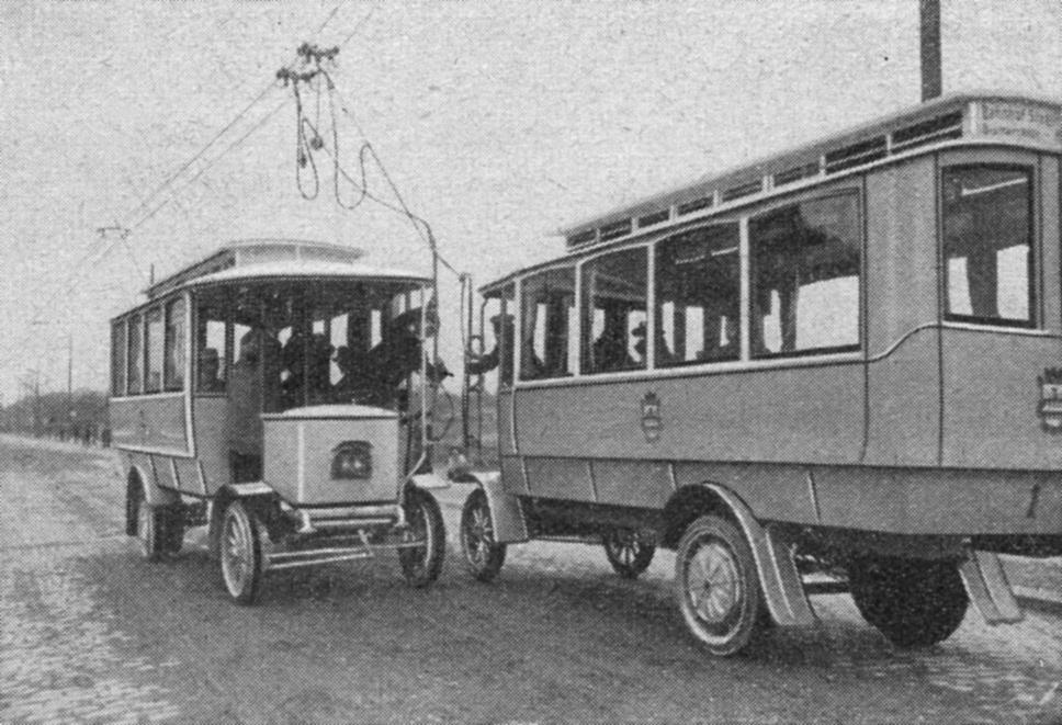 Oberleitungsomnibusse in Steglitz beim Begegnen